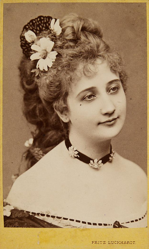 Porträt Mila Röder. Fotopapier auf Karton, SWa